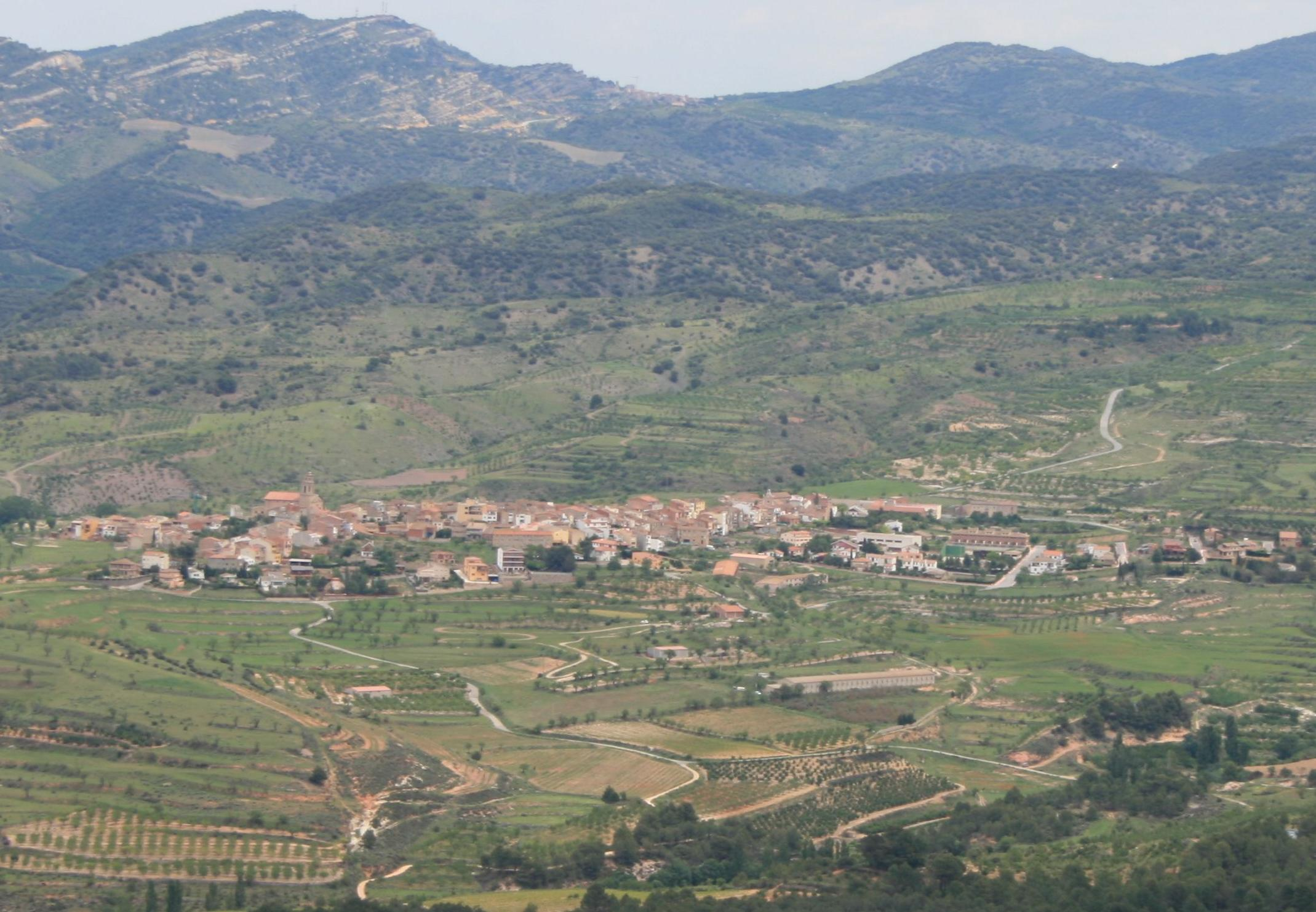 Ulldemolins vist des de la Cornereda